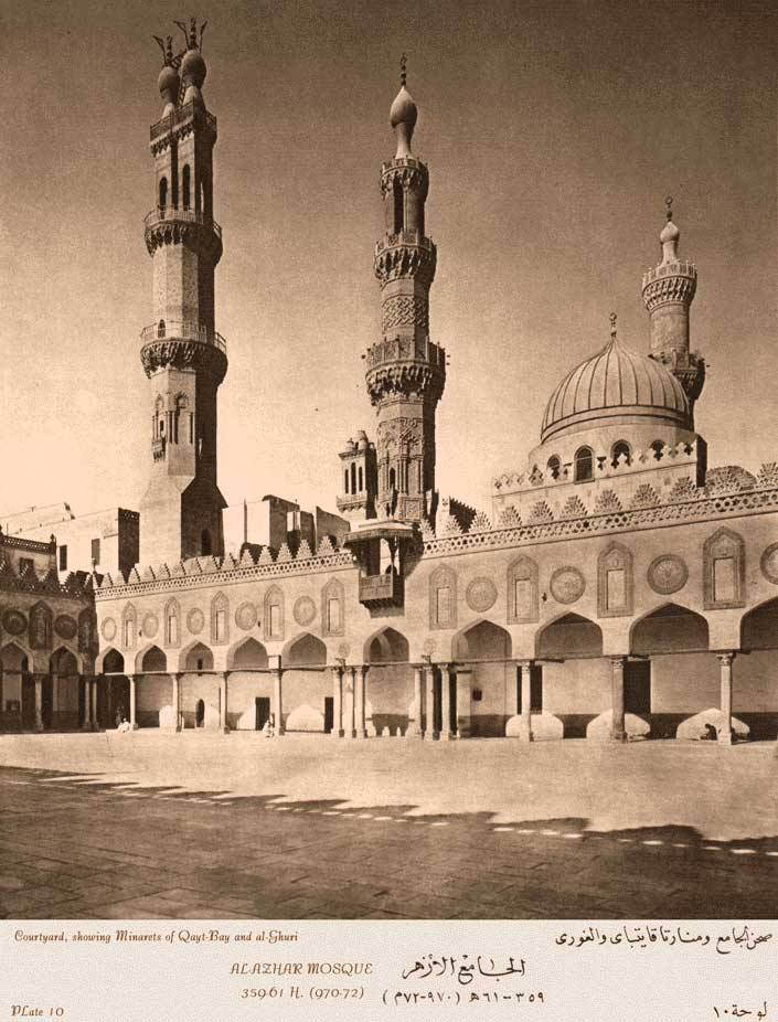 Le Caire (Égypte) - La Mosquée al-Azhar au début du XXe siècle